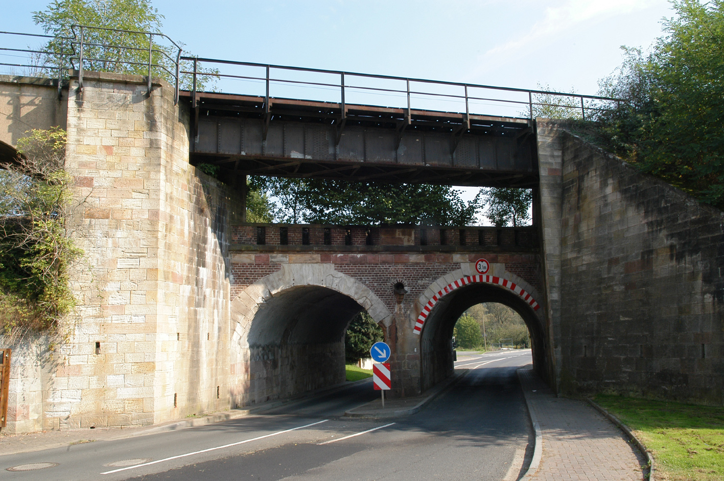 Malsfeld: Rampe (oben) von der Friedrich-Wilhelms-Nordbahn (mitte) zur Kanonenbahn Aufnahme 25.09.2005 selber fotografiert